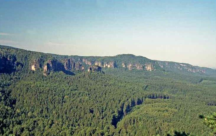 Winterstein a Kleiner Winterberg z vyhlídky Teichstein autor:Zp Licensing Bild:Kleiner Winterberg.jpg